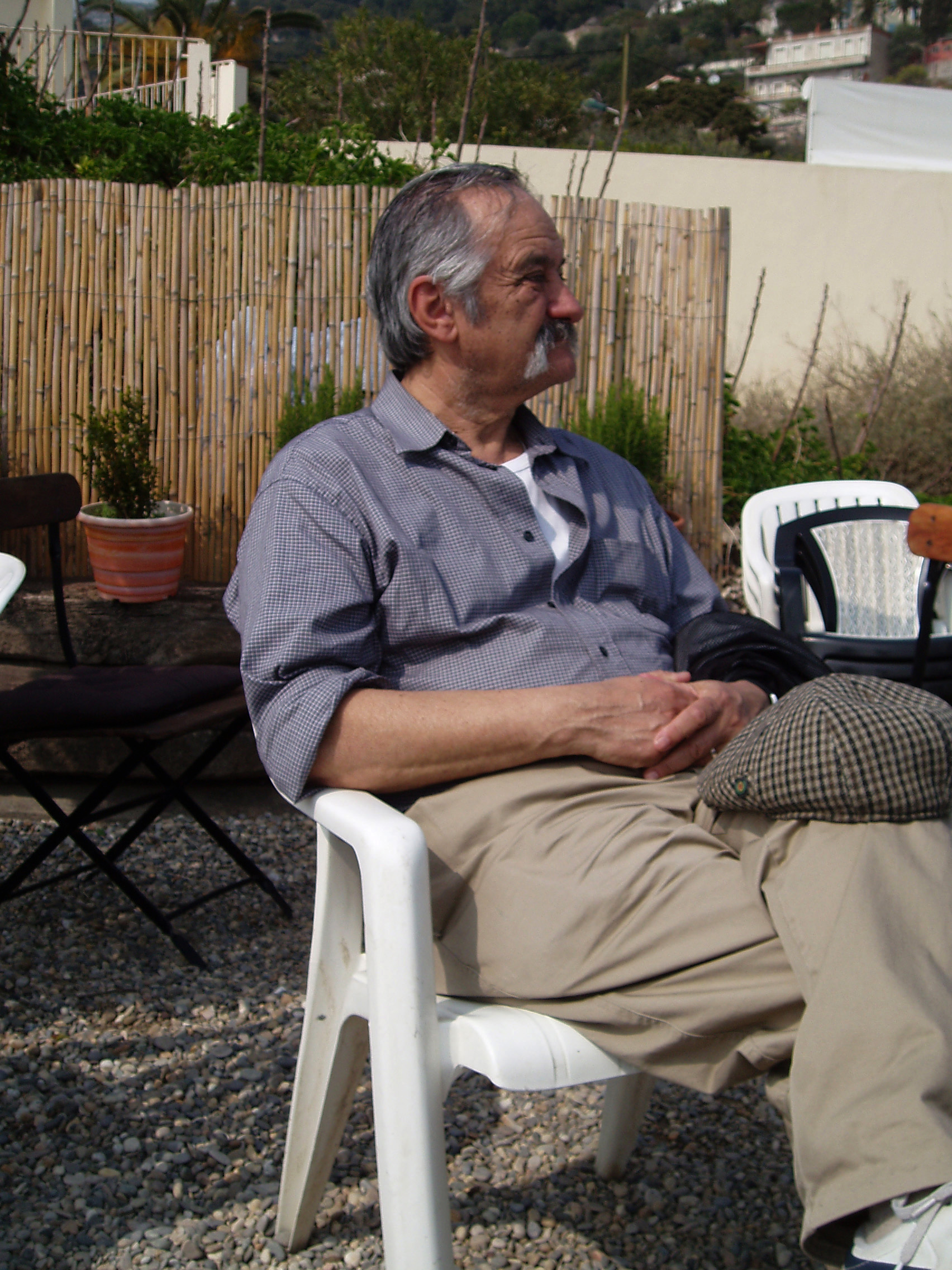 Писатель Б.М.Носик